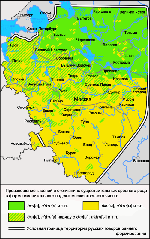 Карта распространения диалектного явления русского языка в области морфологии: произношение гласной в окончаниях существительных среднего рода в форме именительного падежа множественного числа. Источники: Захарова К. Ф., Орлова В. Г., Сологуб А. И., Строганова Т. Ю. Образование севернорусского наречия и среднерусских говоров / Ответственный редактор В. Г. Орлова. — М.: «Наука», 1970. — С. 151 (Карта 41. Произношение гласного флексии именительного падежа мн. ч. существительных среднего рода.)